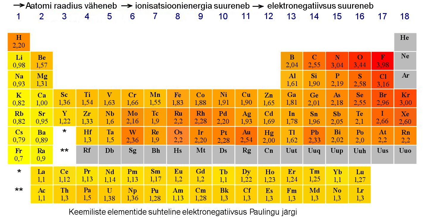 Joonistasin artikli Elektronegativitet põhjal